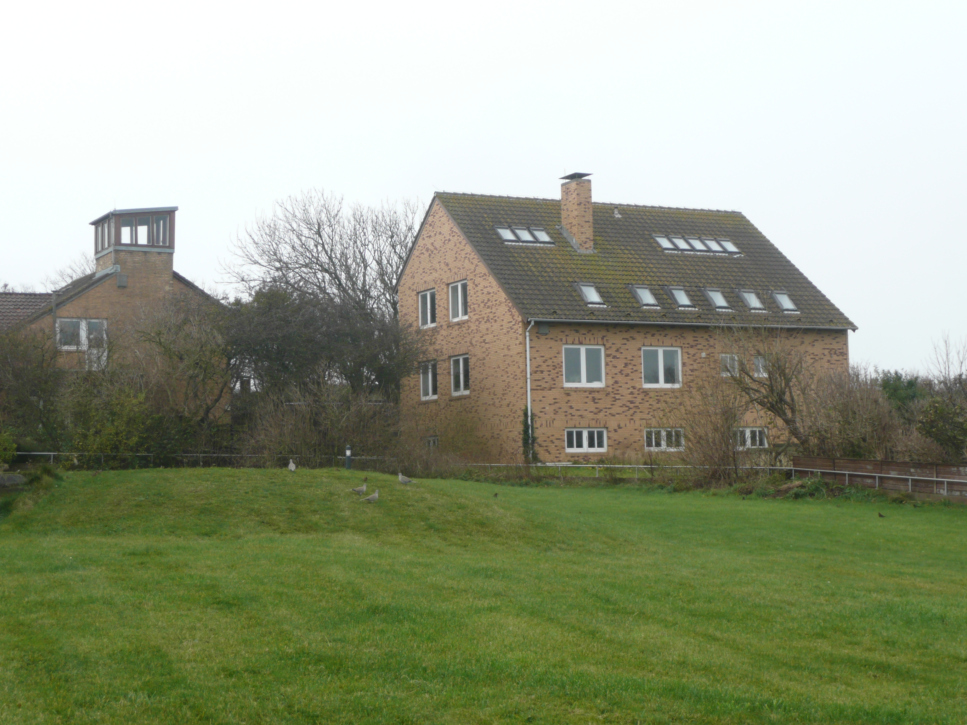 Achtung: Dieses Bild ist nicht gemeinfrei= Das Bild ist frei benutzbar, aber es besteht Urheberrechtsschutz. Es steht unter der Lizenz „Namensnennung – Weitergabe unter gleichen Bedingungen 3.0 Deutschland“. Das Bild darf nur kostenlos verwendet werden, wenn der Urheber entsprechend der Lizenzbedingungen wie folgt angegeben wird: Jens Freitag, .Ein Link zu meiner Homepage ist erwünscht. Zudem würde ich mich über eine E-Mail an mit Informationen bezüglich der Nutzung freuen. This photo was taken by Jens Freitag. This photo may be used, but it is copyrighted – licence „Namensnennung – Weitergabe unter gleichen Bedingungen 3.0 Deutschland“ (ShareAlike). You may only use this picture free of charge if you reference the author in accordance with the licence: Jens Freitag, . I would appreciate a link to my website. In addition, I would also appreciate an email to with information regarding the use of the picture.